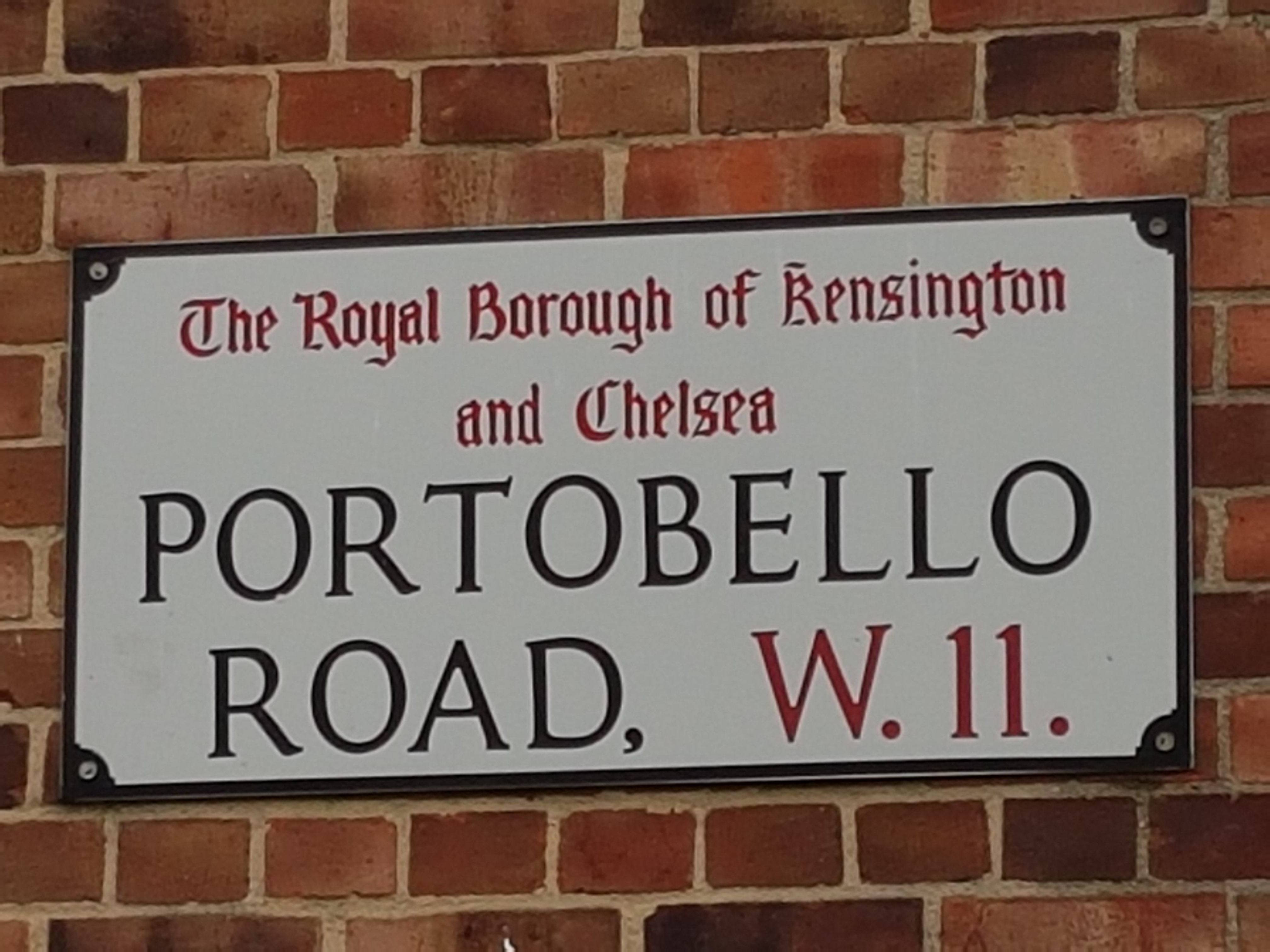 Placa com endereço de uma rua em Notting Hill (Londres).